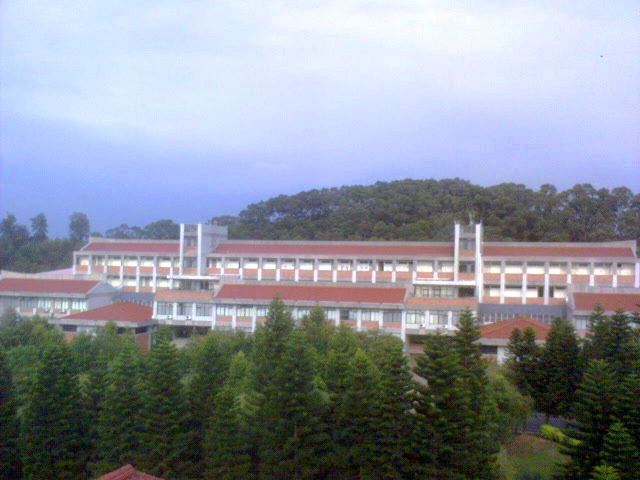 臺灣新竹中華大學的工程一館